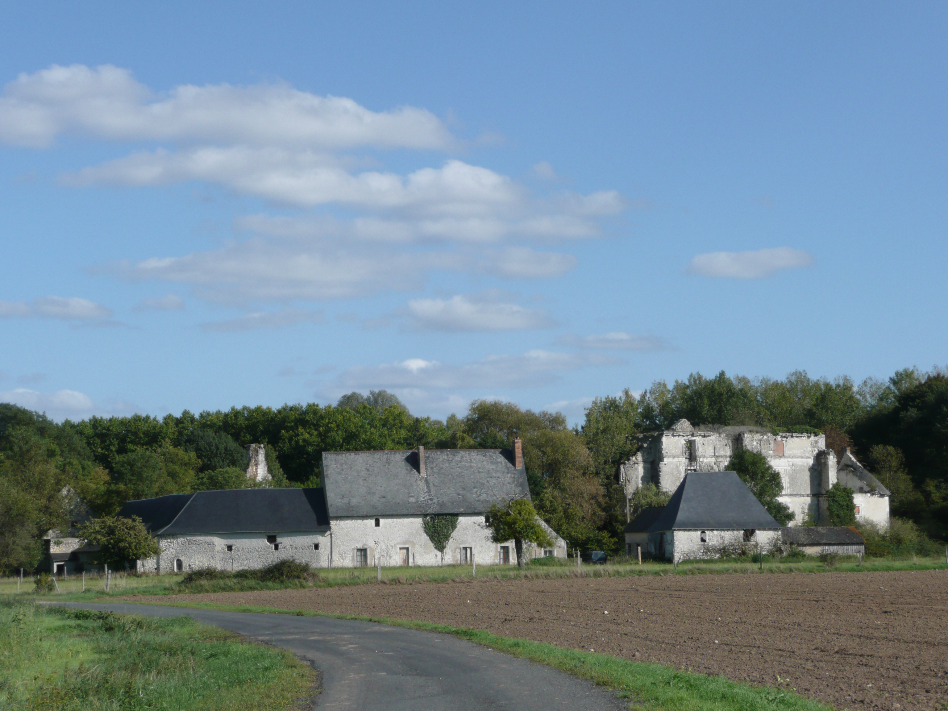 Dénezé sous Lude - Manoir de Launay-le-Jeune .